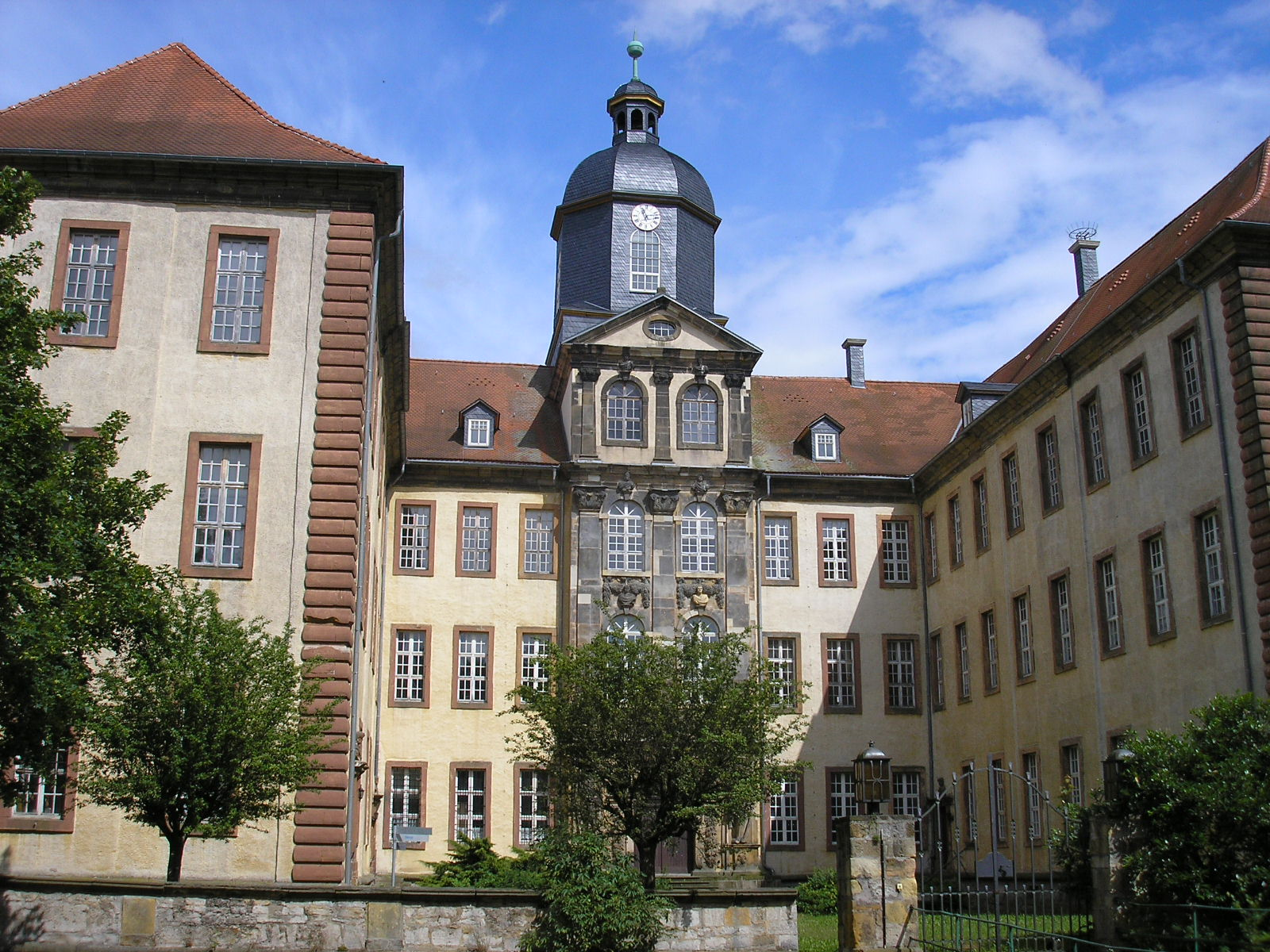 Das Schloss Friedrichswerth (Thüringen).